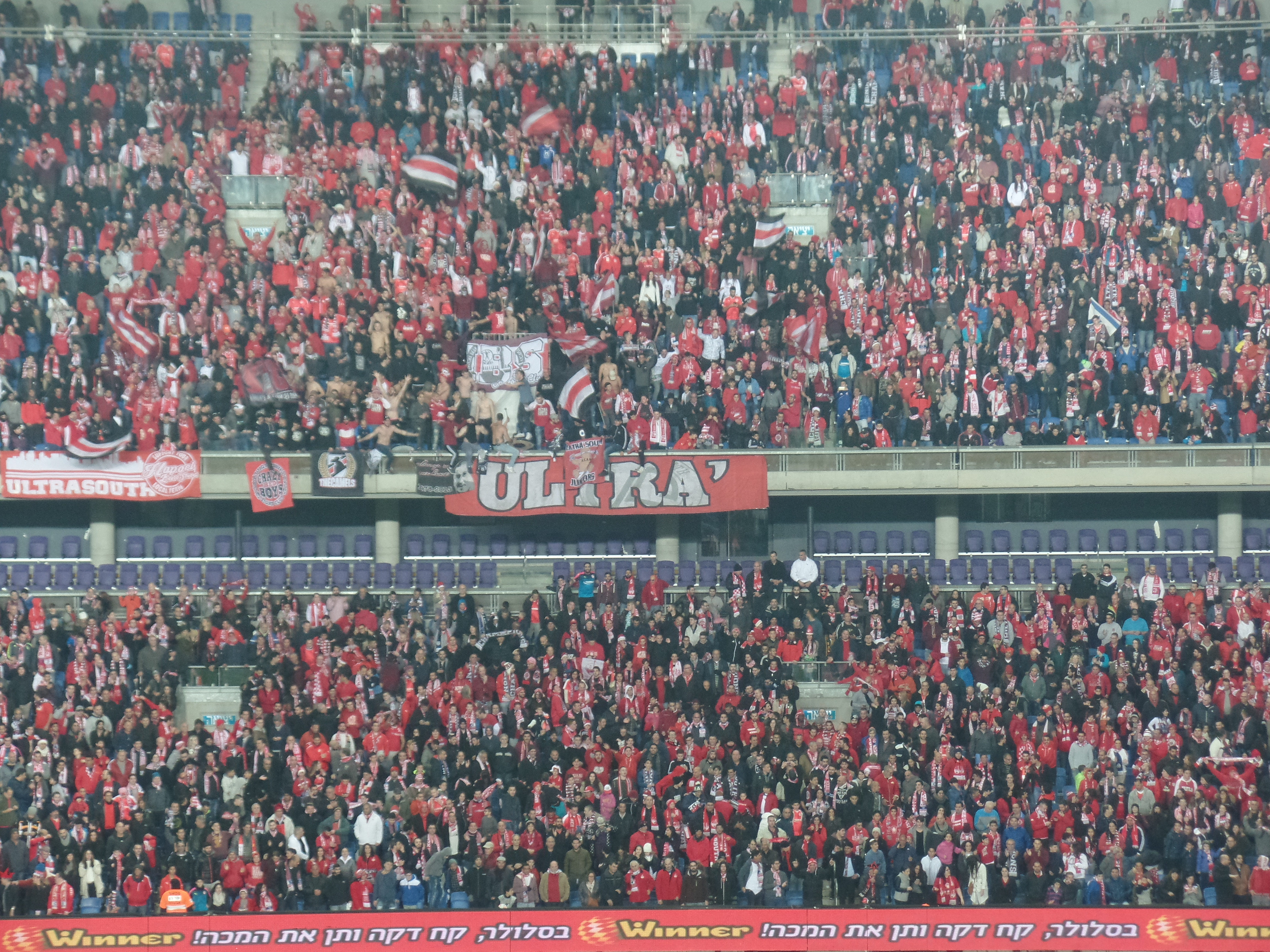 הפועל באר-שבע - קהל